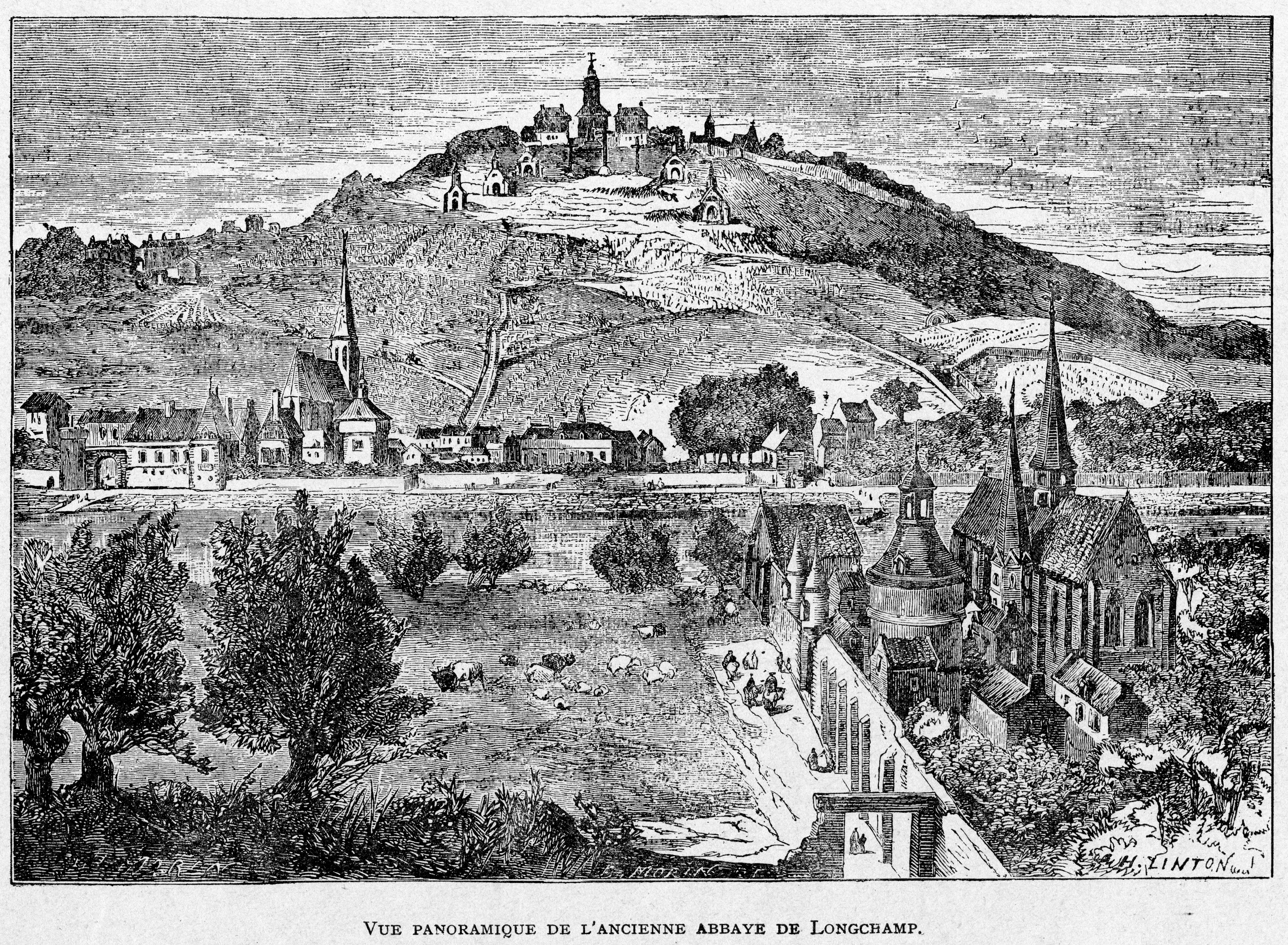 Corbel005 Vue panoramique de l'ancienne abbaye de Longchamp